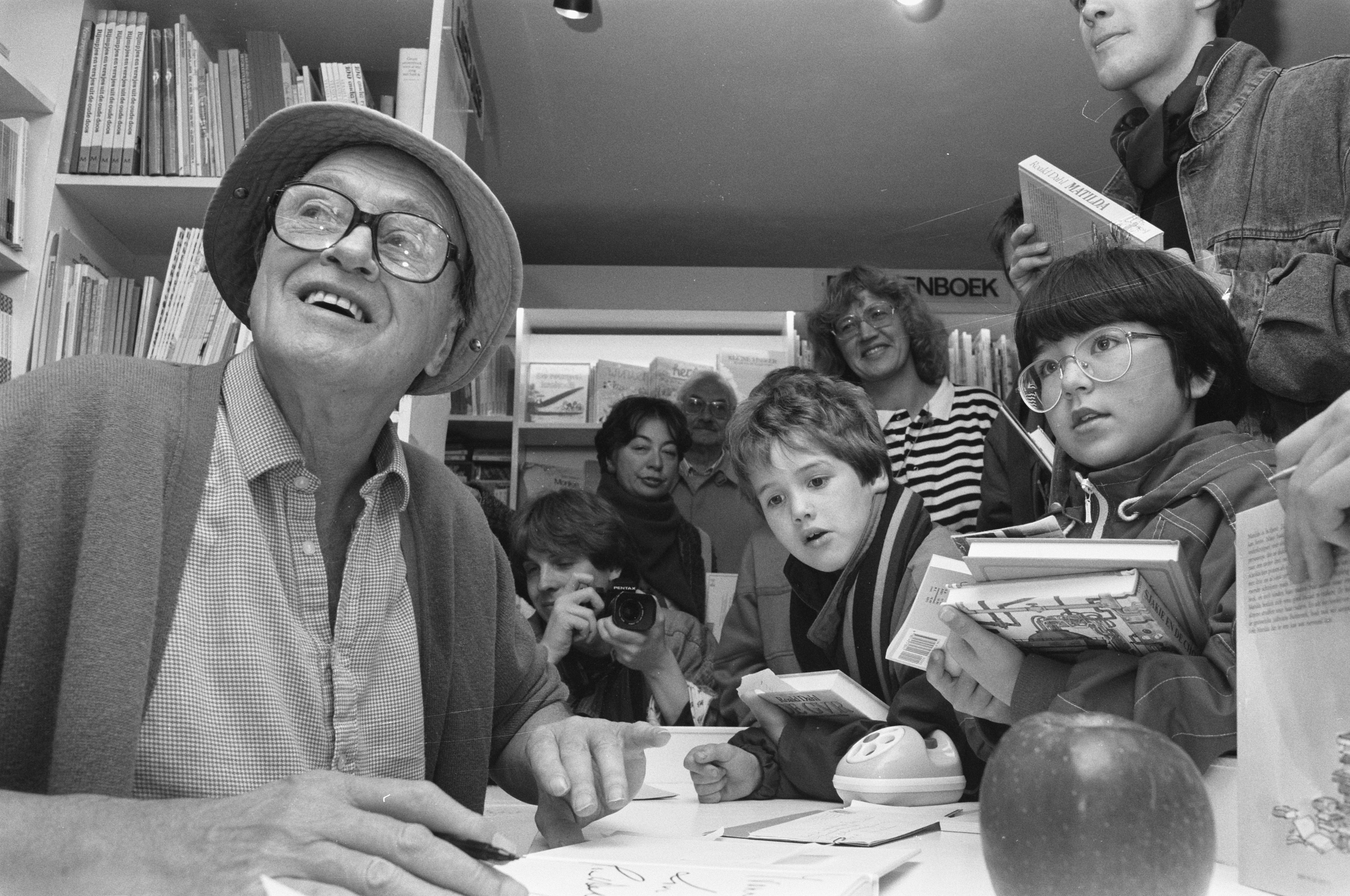 Collectie / Archief : Fotocollectie Anefo Reportage / Serie : [ onbekend ] Beschrijving : Roald Dahl signeert boeken in de Kinderboekenwinkel in Amsterdam Datum : 12 oktober 1988 Locatie : Amsterdam, Noord-Holland Trefwoorden : BOEKEN, handtekeningen, kinderen, schrijvers Fotograaf : Bogaerts, Rob / Anefo Auteursrechthebbende : Nationaal Archief Materiaalsoort : Negatief (zwart/wit) Nummer archiefinventaris : bekijk toegang 2.24.01.05 Bestanddeelnummer : 934-3367